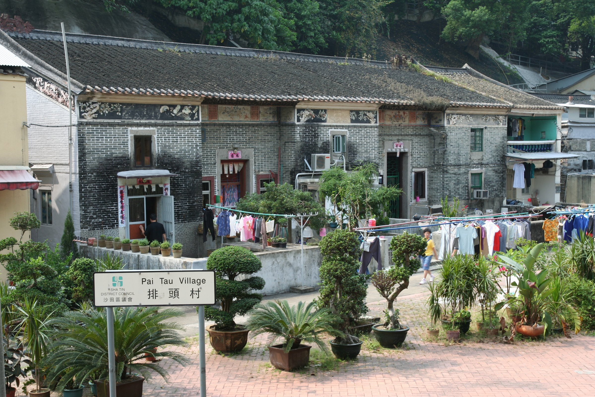 Sha Tin 排頭村 Pai Tau Village